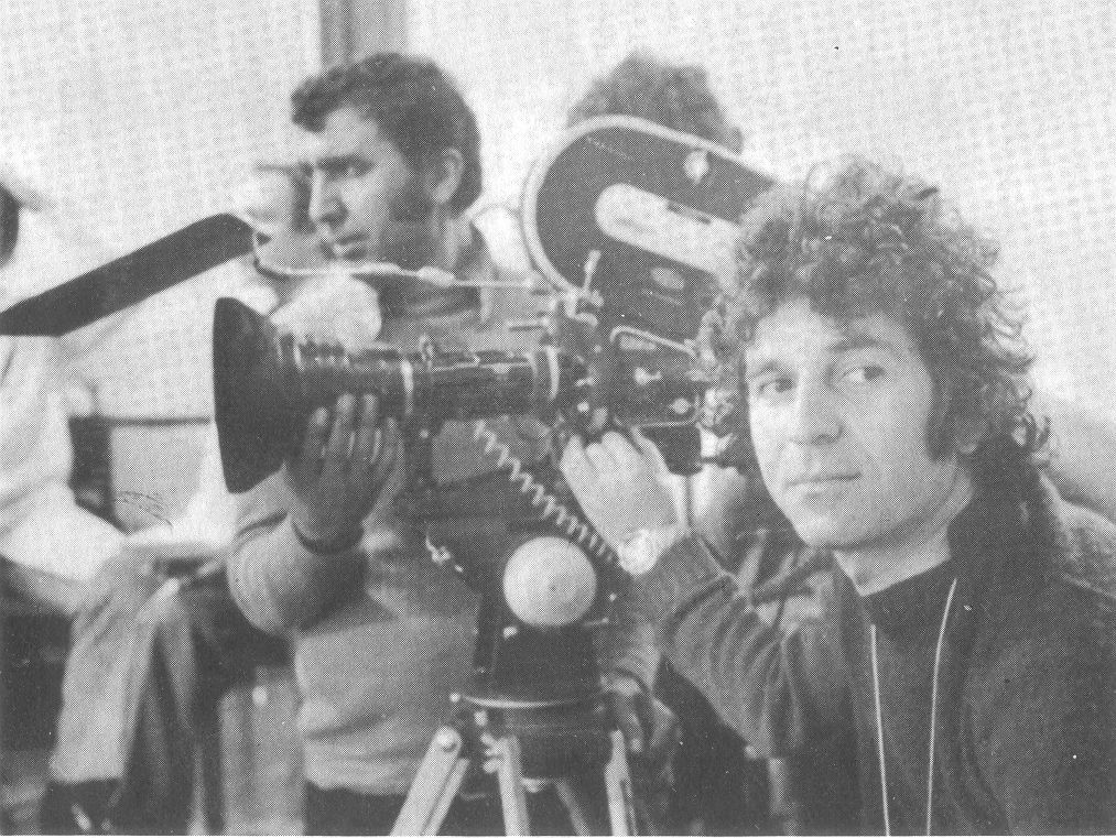 dariush mehrjui "dayerh mina" (Film), 1973.